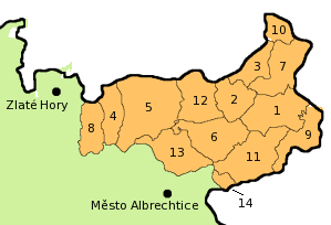 Česky: Osoblažská enkláva